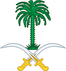 شعار دولة المملكة العربية السعودية وهو متاح للجميع